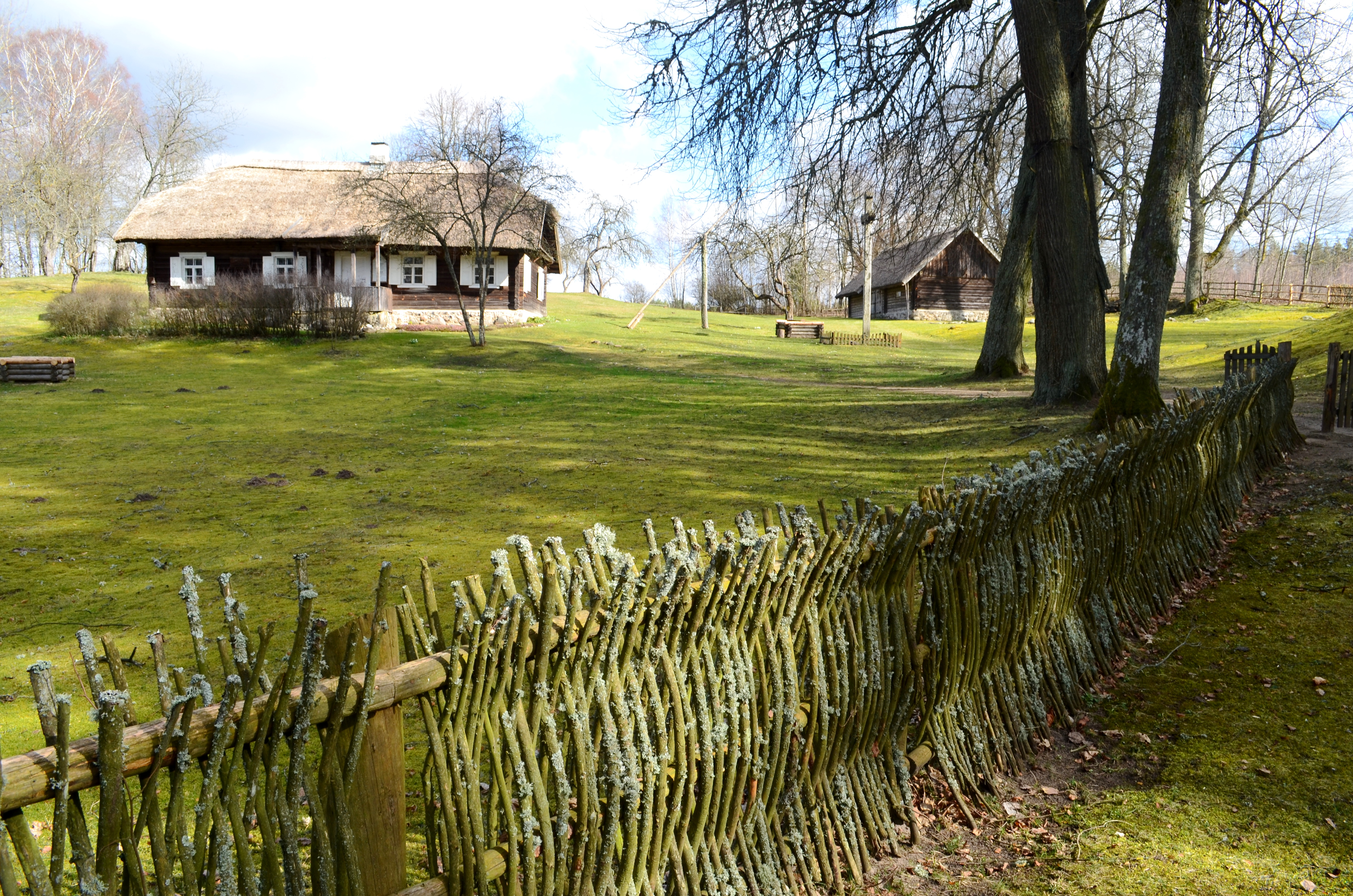 J. Biliūno sodyba, Niūronys, Anykščių raj.